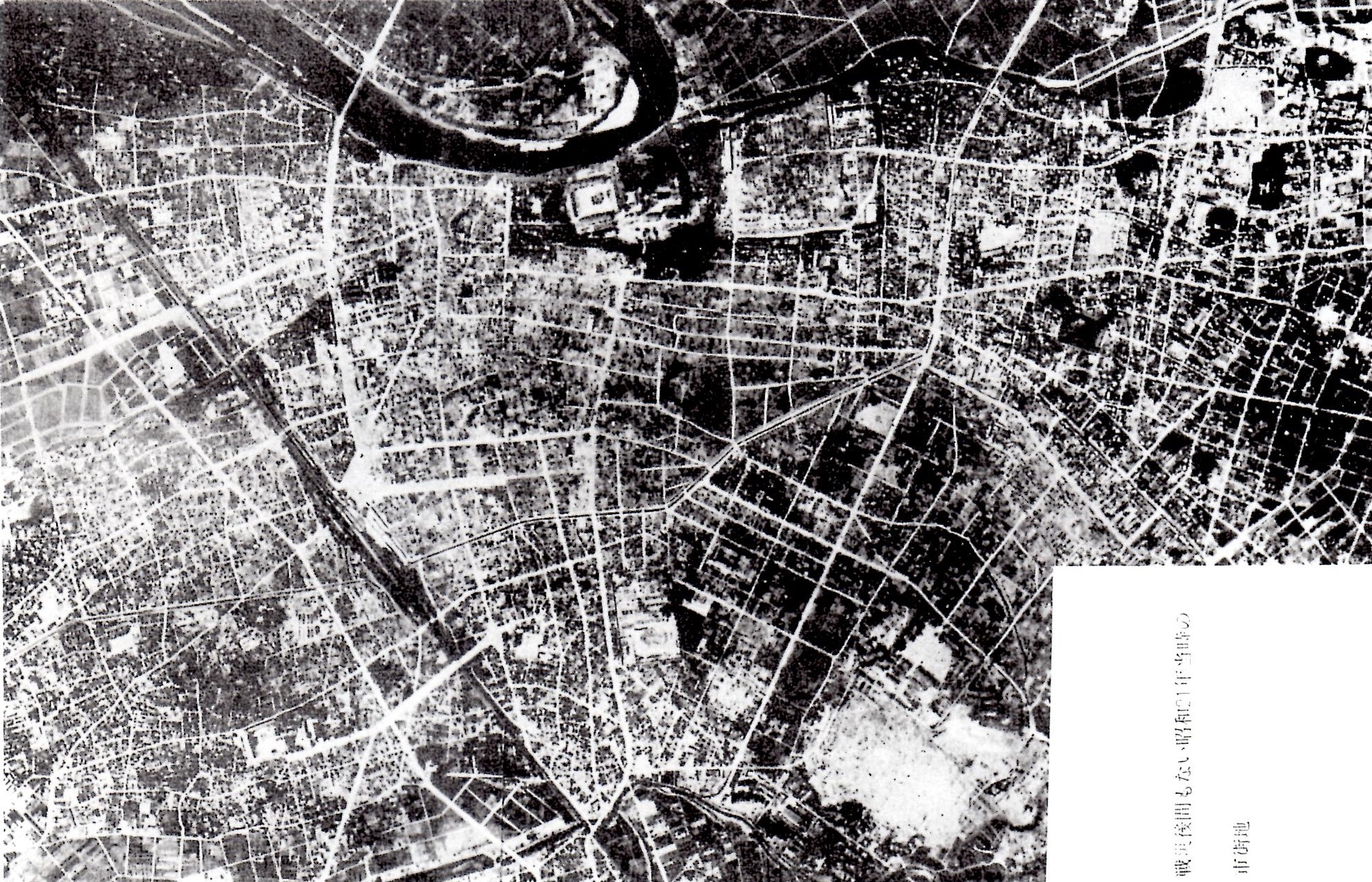 1946年に撮影された、1945年6月の豊橋空襲から間もない豊橋市街地。